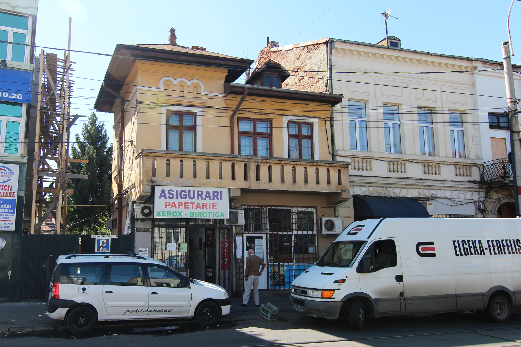 Casă pe Calea Călărașilor